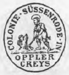 Altes Siegel des Ortes Süßenrode im Kreis Oppeln, Schlesien.